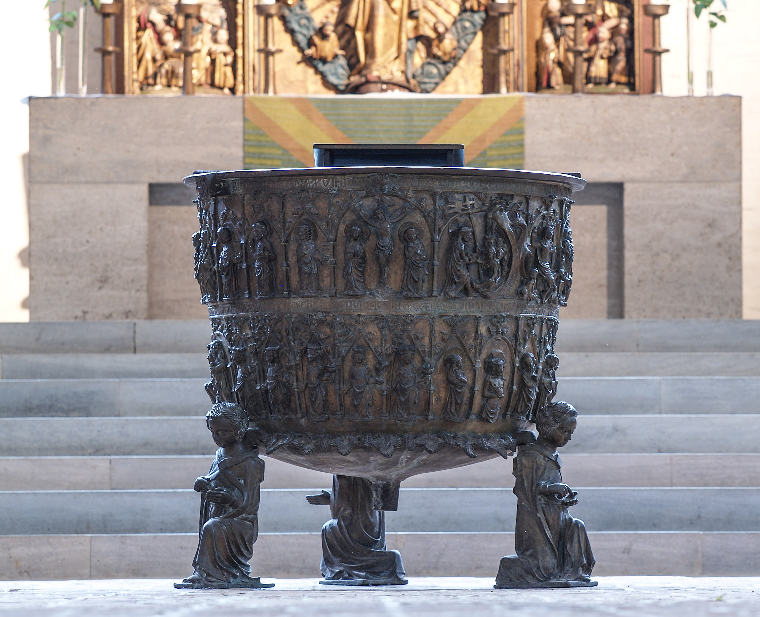 Das Taufbecken in der Marienkirche in Lübeck aus westlicher Richtung unter dem Altar hindurch fotografiert